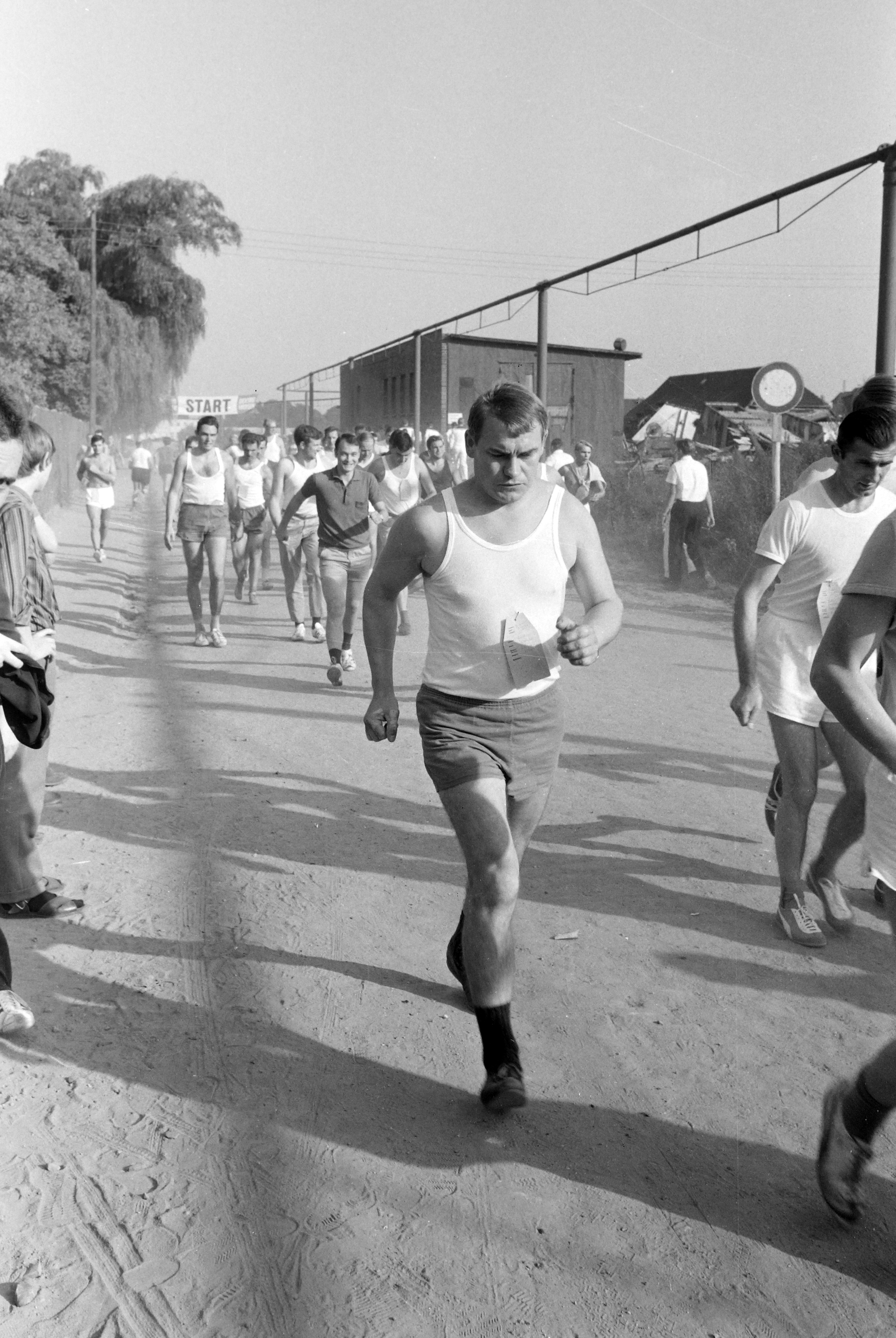 Diese noch undatierte Aufnahme aus dem Nachlass des Fotografen Jochen Mellin zeigt einen Gehen-Wettlauf mit zahlreichen Teilnehmer unmittelbar nach dem Start an einen noch unidentifizierten Ort unbekannten Datums Das Digitalisat wurde am 27. Juni 2017 erstmals vom Bildarchiv der Region Hannover (Signatur ARH NL Mellin 01-024/0017) der Öffentlichkeit mit der Lizenz CC BY-SA 3.0 zur Verfügung gestellt. Zugleich bittet das Archiv interessierte Bürger um Mitwirkung und Benachrichtigung an das Archiv zu Ort und Datum des Fotos ...